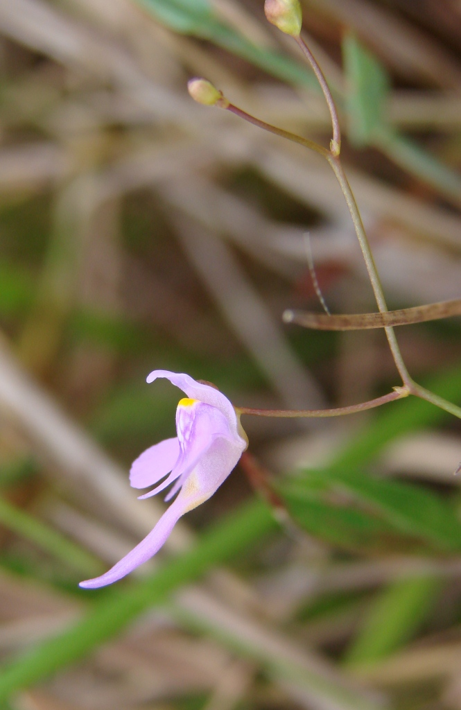 Utricularia amethystina Salzm. ex A.St.-Hil. & Girard - LENTIBULARIACEAE - Parque Estadual dos Pirineus - Pirenópolis - Goiás - Brasil.